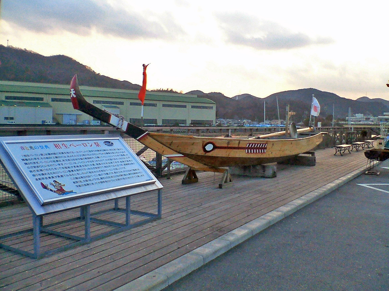 兵庫県相生市相生湾の沿岸に設置されているペーロン船。